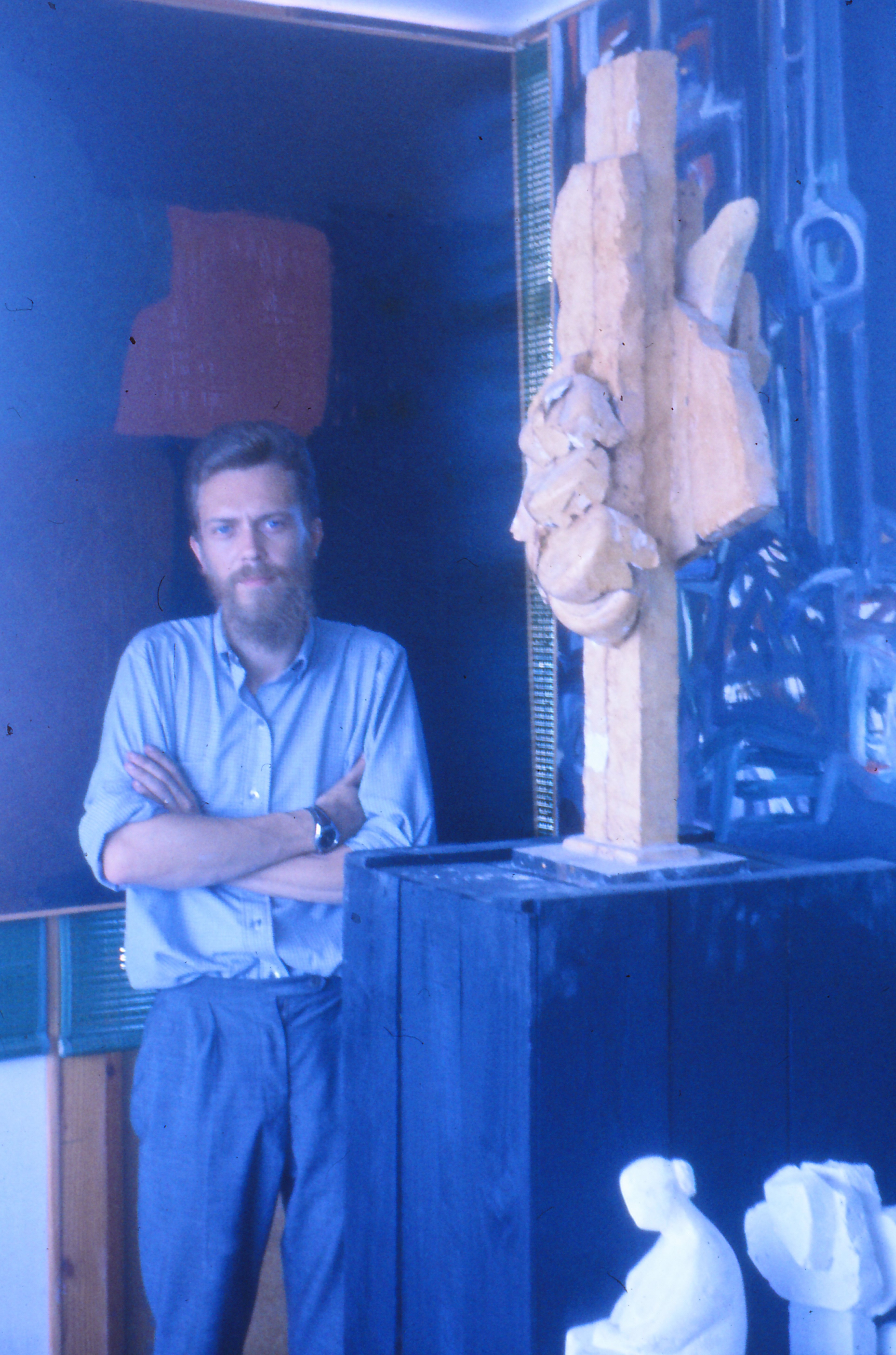 Vid sin ateljé, Norrköping, 1966